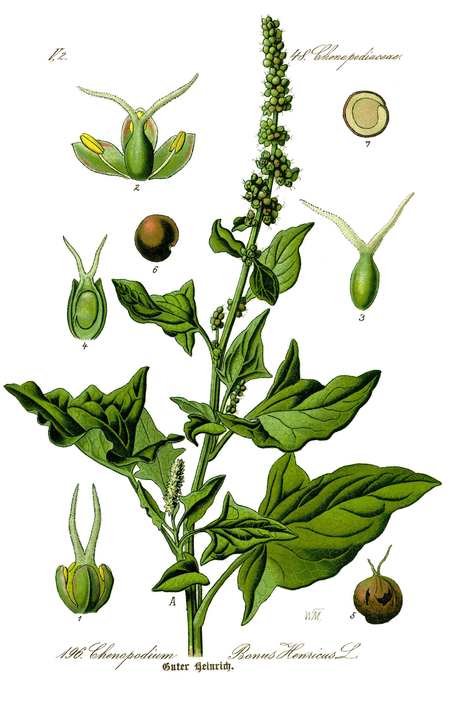 Name Chenopodium bonus-henricus ; Family:Amaranthaceae Original book source: Prof. Dr. Otto Wilhelm Thomé Flora von Deutschland, Österreich und der Schweiz 1885, Gera, Germany Permission granted to use under GFDL by Kurt Stueber